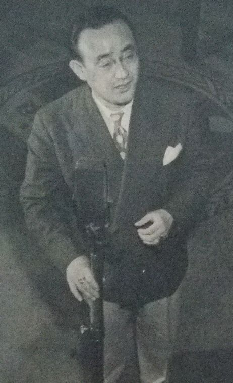 霧島昇